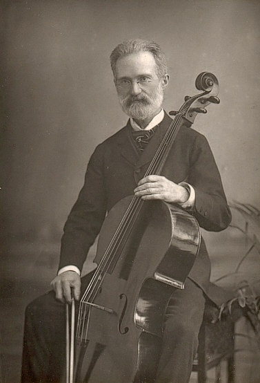 Foto de Carlo Alfredo Piatti